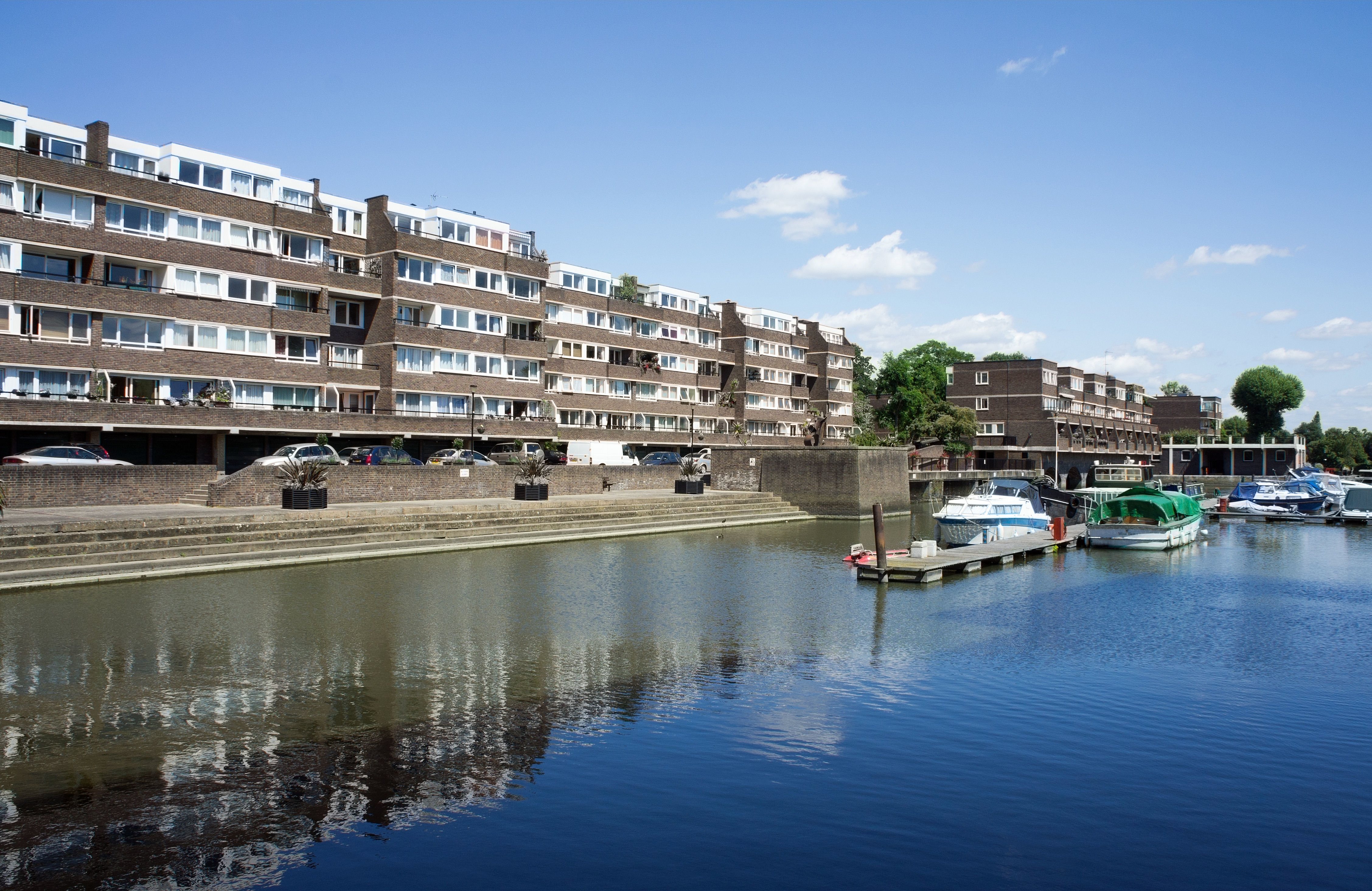 Brentford Docks Marina